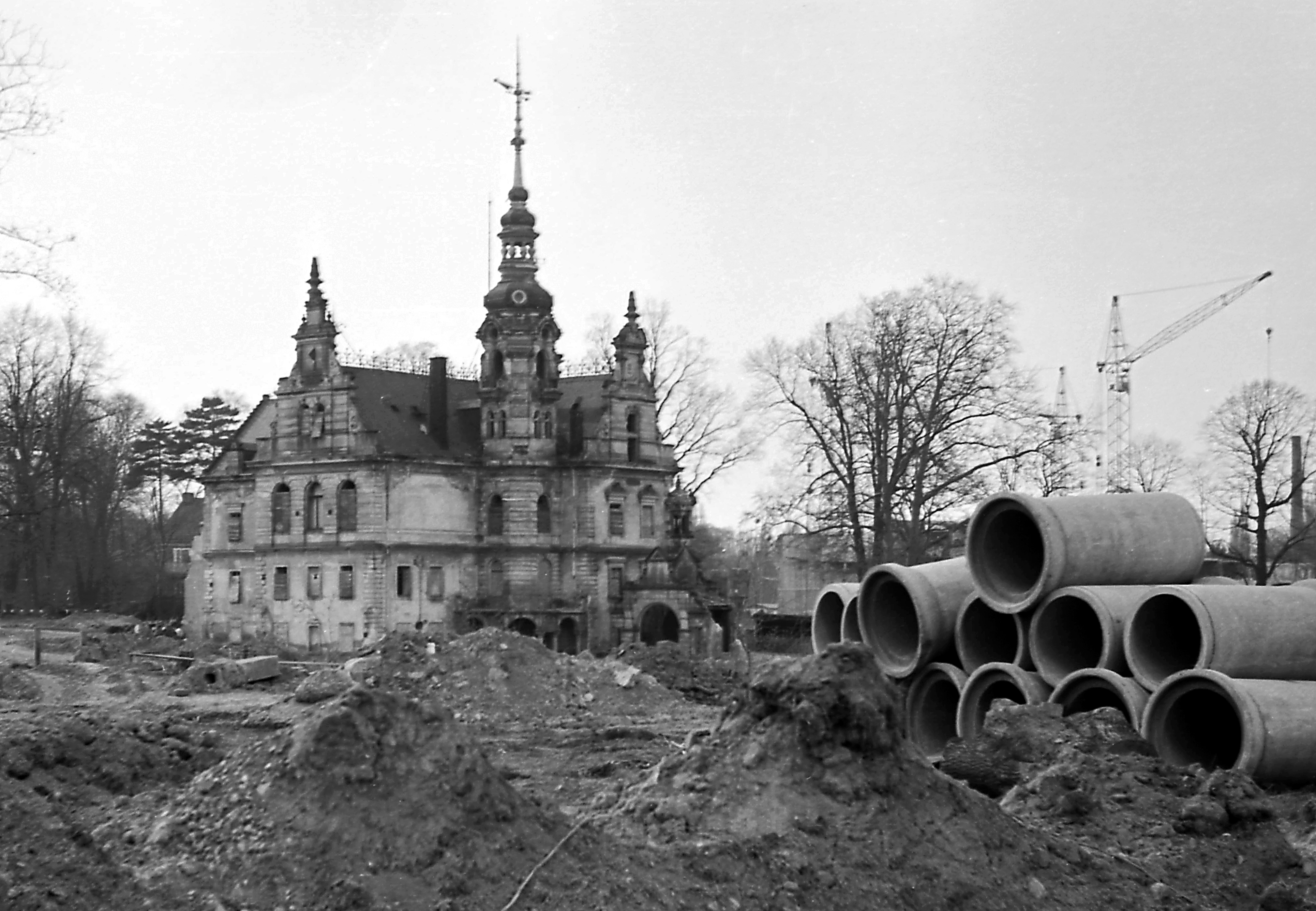 16.04.1978 DDR 8036 [01239] Dresden-Prohlis, Gamigstraße: Das Prohliser Schlößchen (GMP: 51.005429,13.791400). 1888/89 ließ Johann Christian Freiherr von Kap-herr das Schloß Prohlis vom Architekten, dem Semperschüler Bernhard Schreiber, im Neorenaissancestil errichten. 1945 besetzten sowjetische Soldaten die vom Krieg weitgehend unbeschadet gebliebene Schlossanlage. Ab 1954 wurde die Gutsanlage vom Volksgut Pillnitz zur Schweine- und Rinderhaltung genutzt. Bedingt durch den zunehmenden Verfall der Anlage erfolgte 1978 die baupolizeiliche Sperrung. Am 17.12.1980 brannte aus ungeklärter Ursache das Schloß nieder. Für den Wiederaufbau fehlte das Geld und so wurde das Schloß im März 1985 abgerissen. Rechts wird gerade das Plattenbau-Neubaugebiet Prohlis errichtet. errichtet. [F19780415A52.jpg]19780416101NR.JPG(c)Blobelt